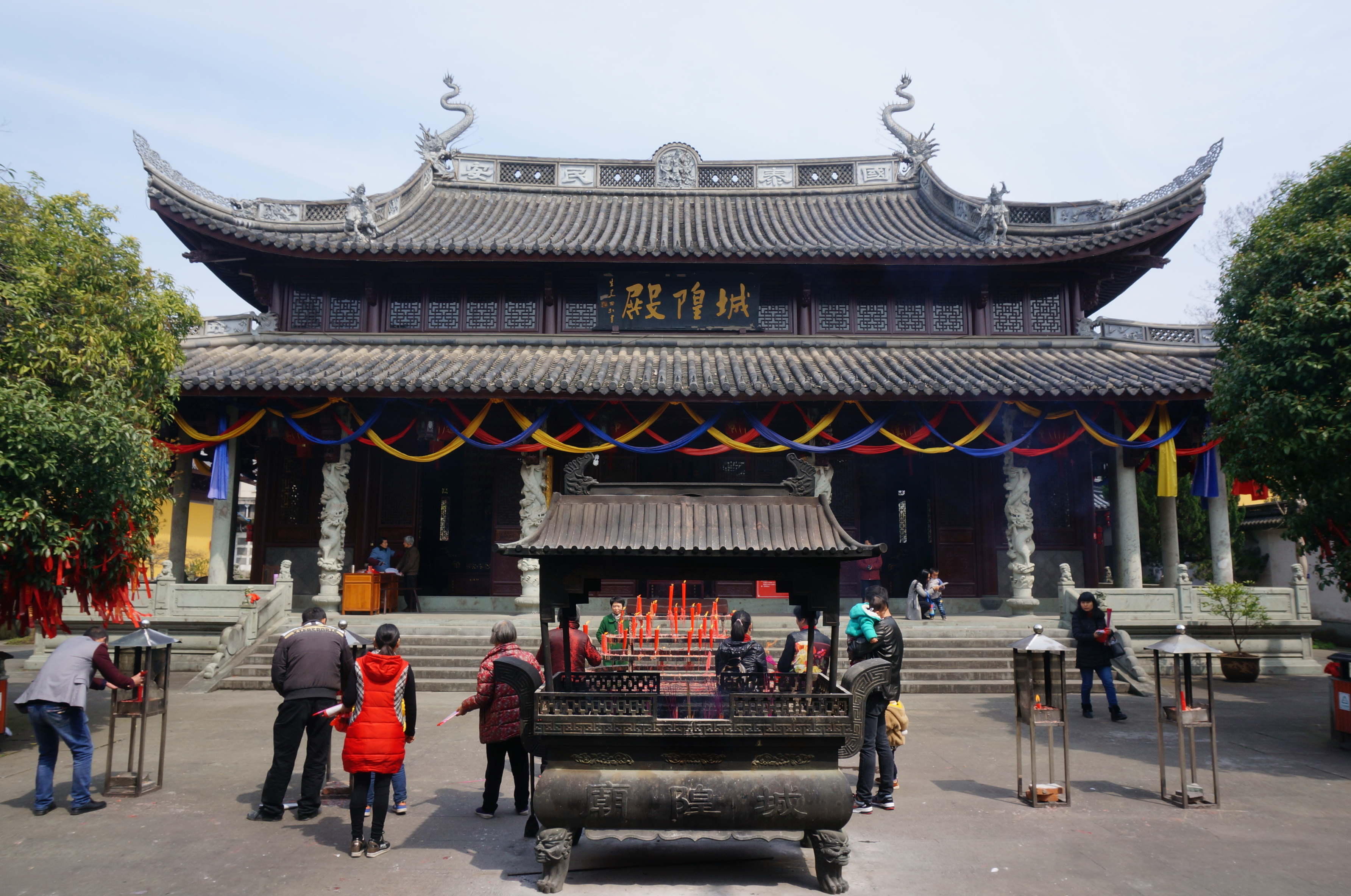 嵊县城隍庙，大殿，南面。